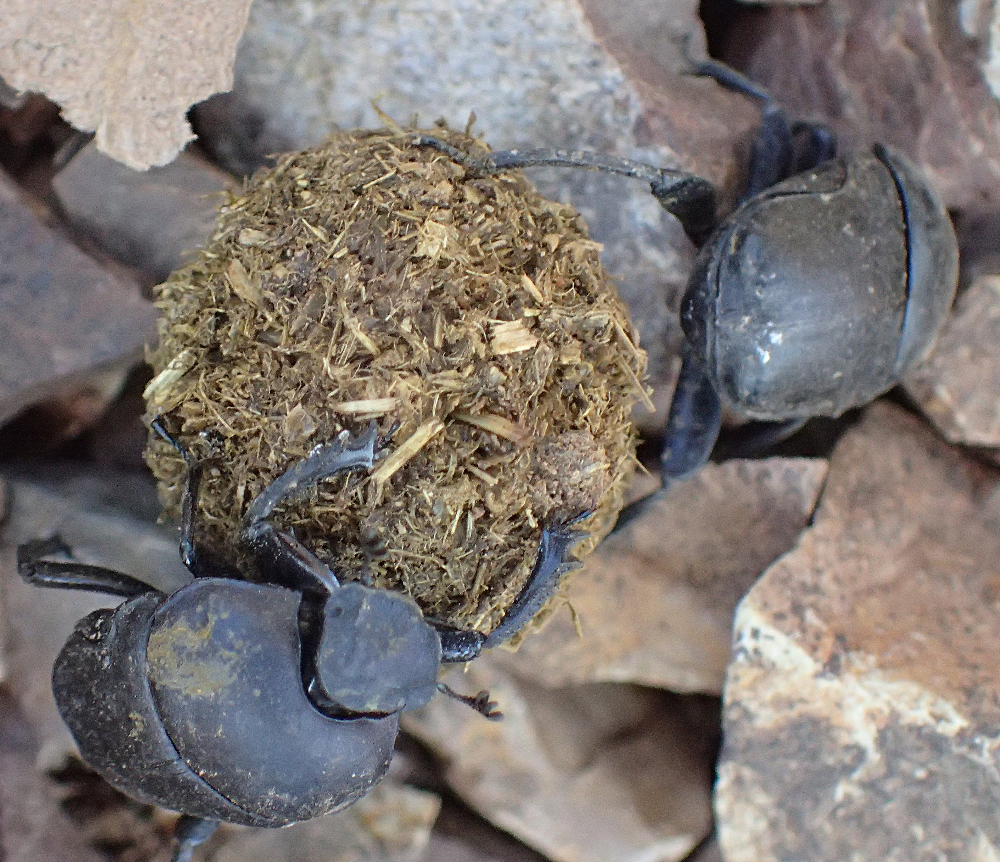 Gymnopleurus geoffroyi aus Griechenland, Peloponnes, bei Andritsena